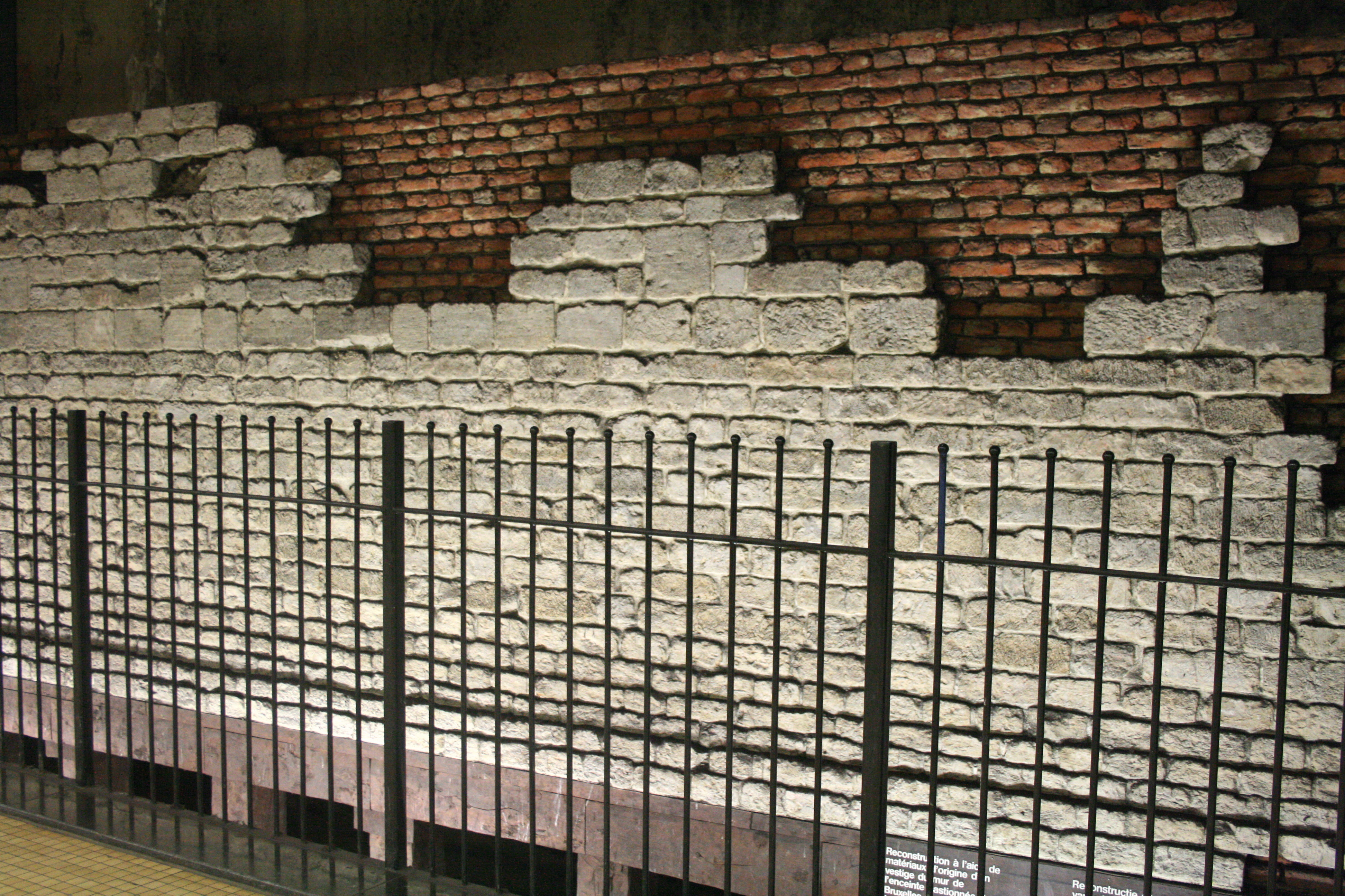 Vestiges du bastion Sainte-Claire (deuxième enceinte de Bruxelles) reconstruits dans la station de métro Hôtel des monnaies, Bruxelles